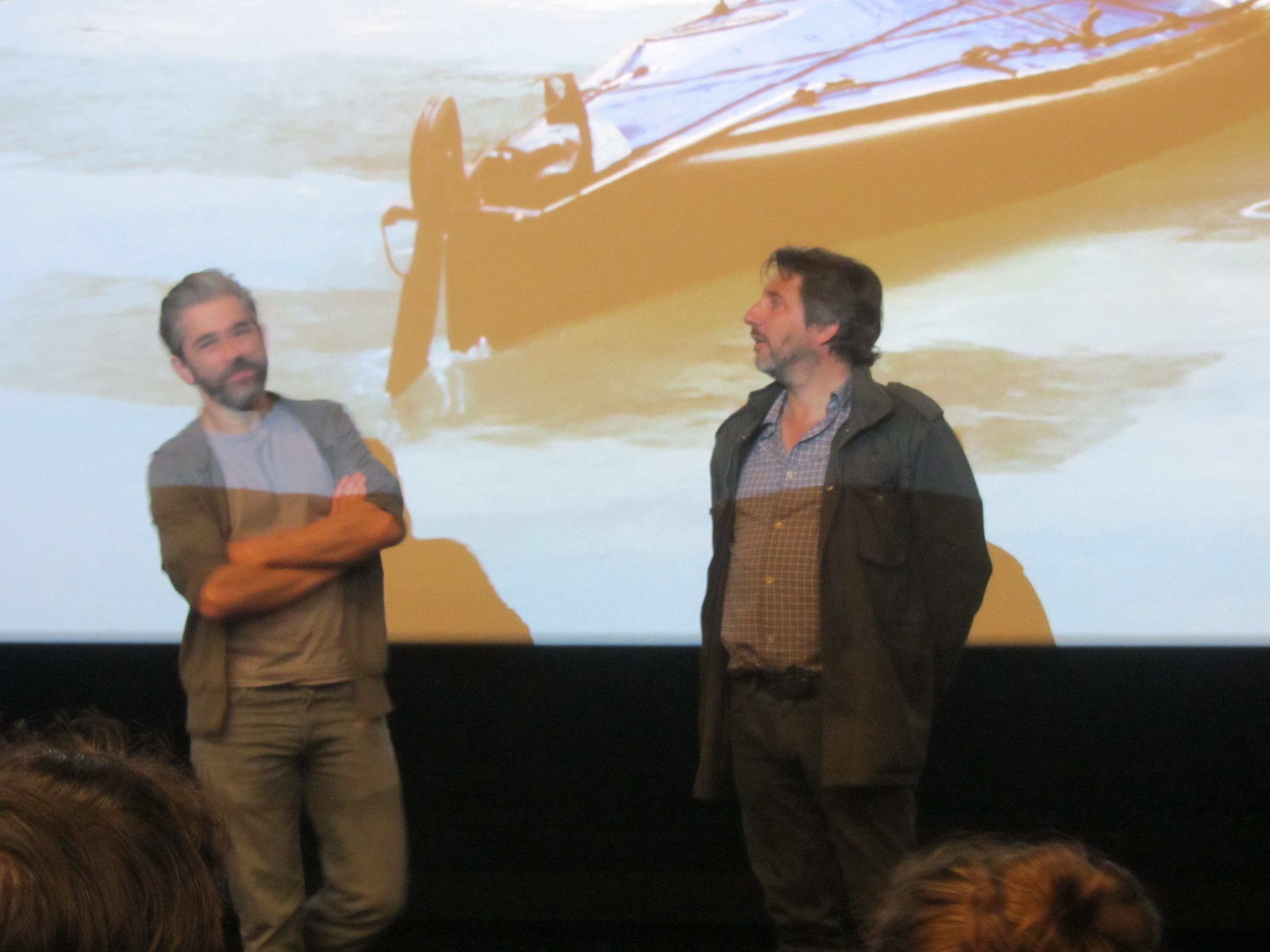 Avant première de Comme un avion à l'UGC Paris 19, Jean-Noël Brouté et Bruno Podalydès